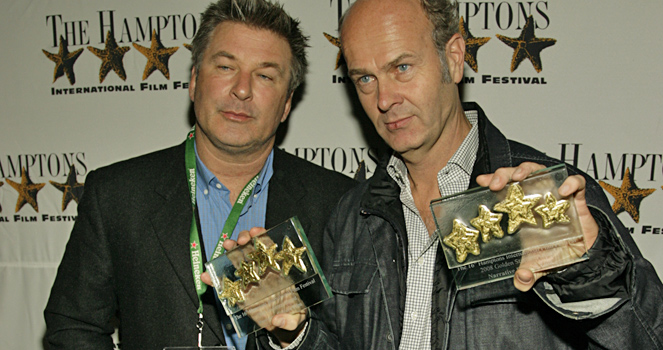 Hamptons